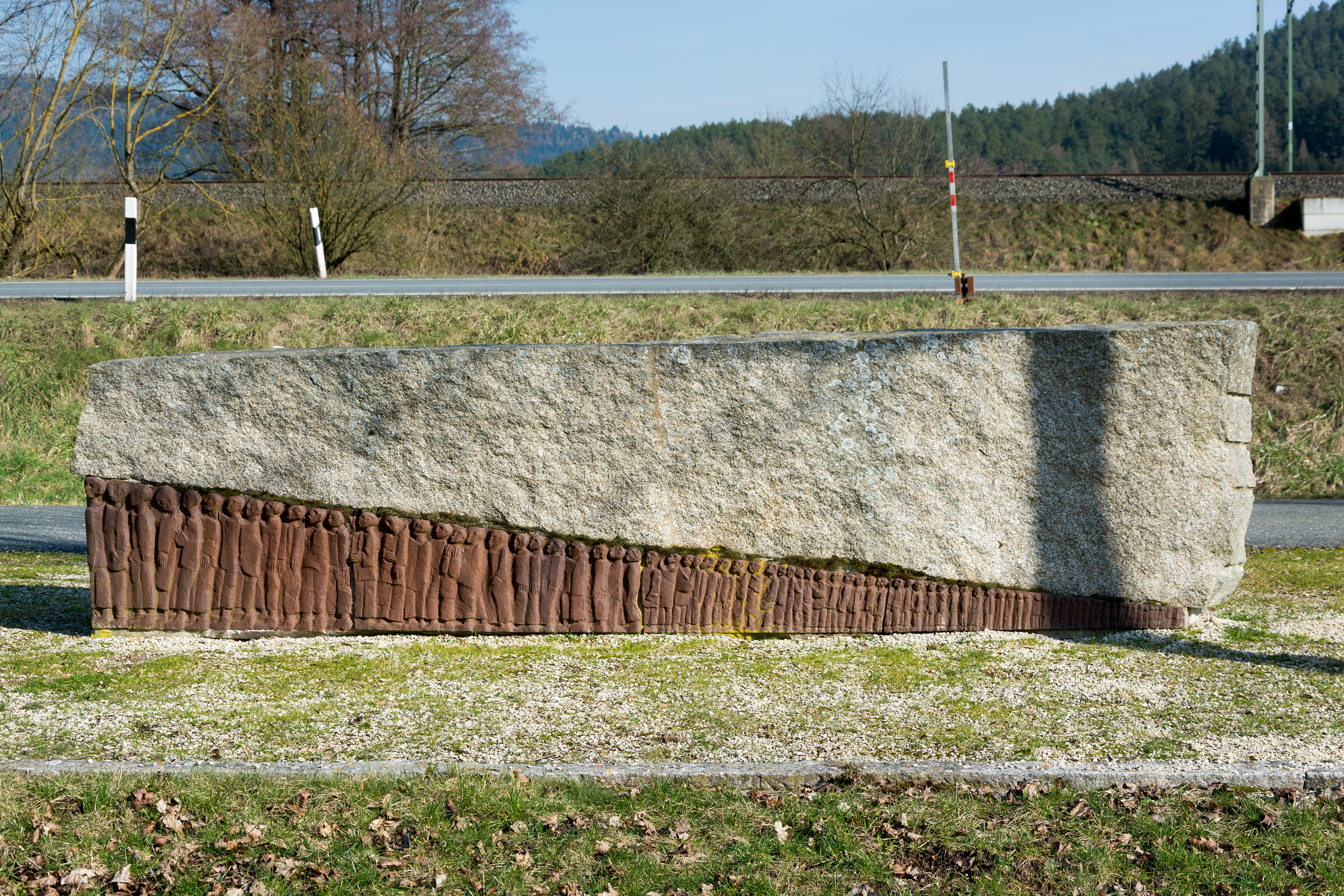 Mahnmal für das KZ-Außenlager Gundelsdorf am Rad- und Fußweg zwischen den beiden Kronacher Ortsteilen Gundelsdorf und Knellendorf. Der vom Kronacher Bildhauer Heinrich Schreiber aus einem Block Flossenbürger Granit geschaffene Gedenkstein zeigt eine Menschenmenge, die unter der Last einer unmenschlichen Diktatur leidet.